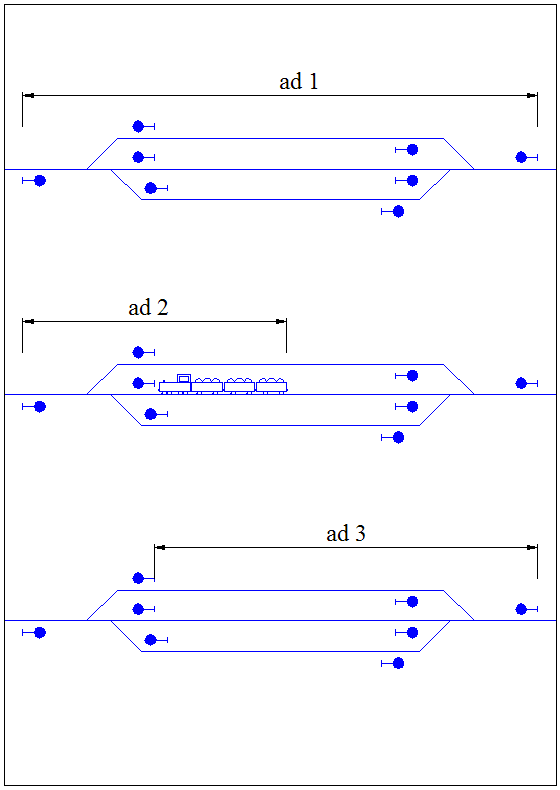 doplnění cesta